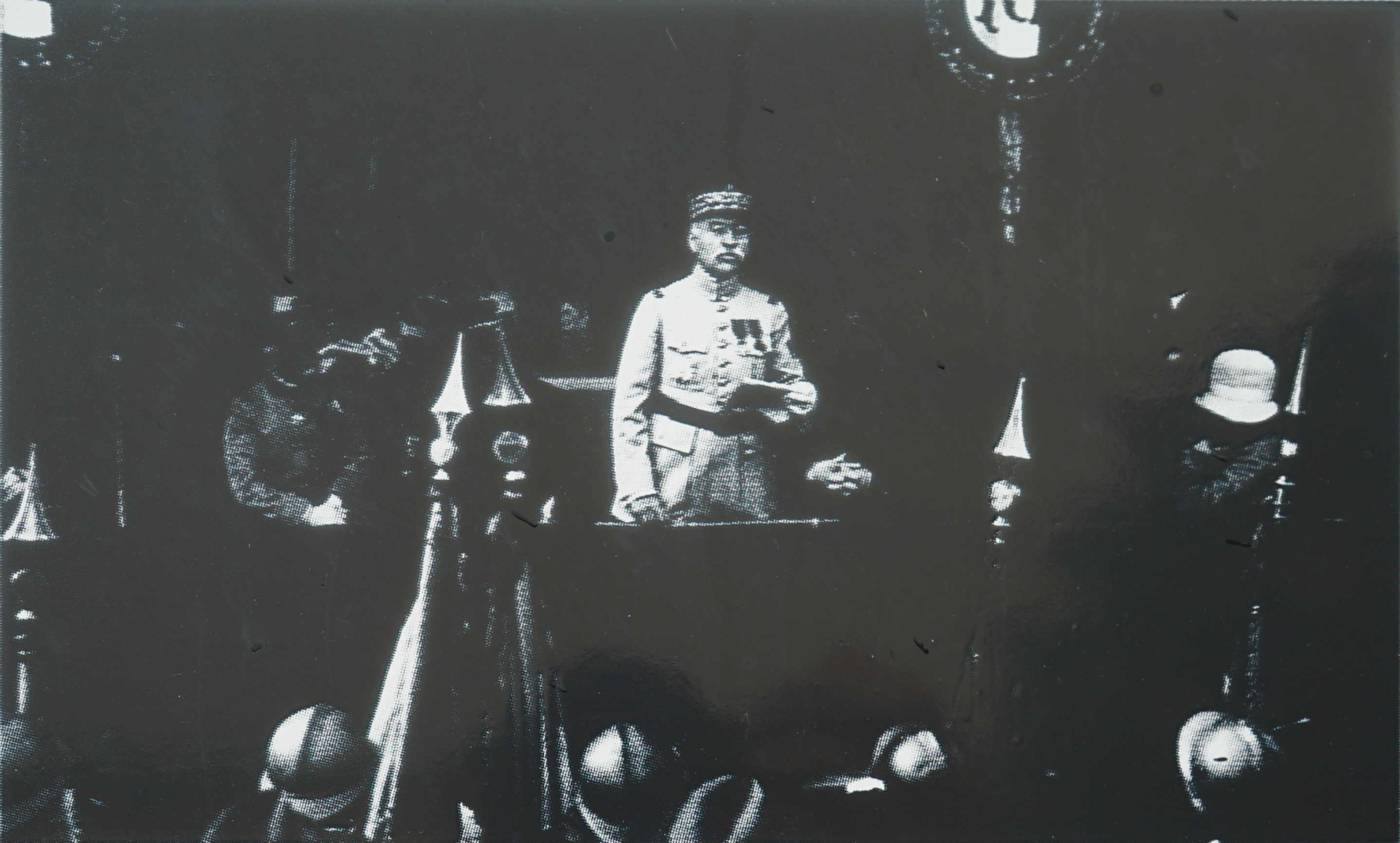 lors de l'inauguration du Monument des Basques.